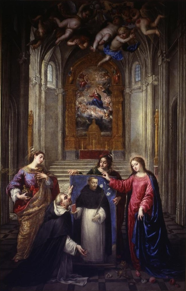 La escena representa la milagrosa aparición de la Virgen María al fraile sacristán de la iglesia del convento dominico construido en 1510 en Soriano (Calabria, Italia), para entregarle la imagen pintada de Santo Domingo de Guzmán, fundador de la Orden de los dominicos, en la noche del 15 de septiembre de 1530. La Virgen, acompañada y atendida por María Magdalena y santa Catalina, le obsequió el lienzo que convirtió al convento dominico de Soriano en un centro de peregrinaje.